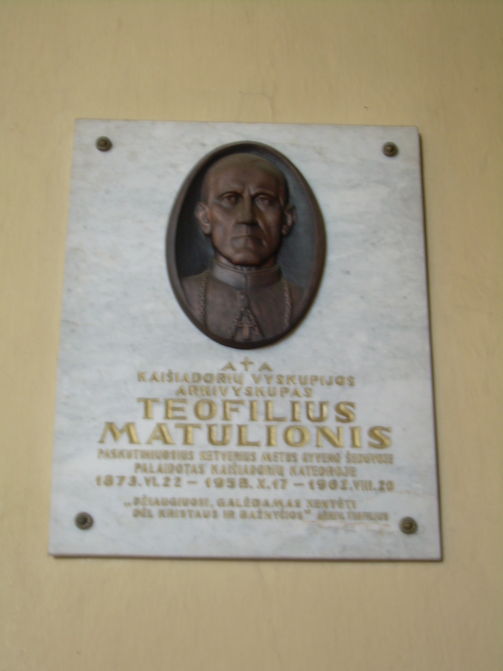 Šeduvos Šv. Kryžiaus Atradimo bažnyčia